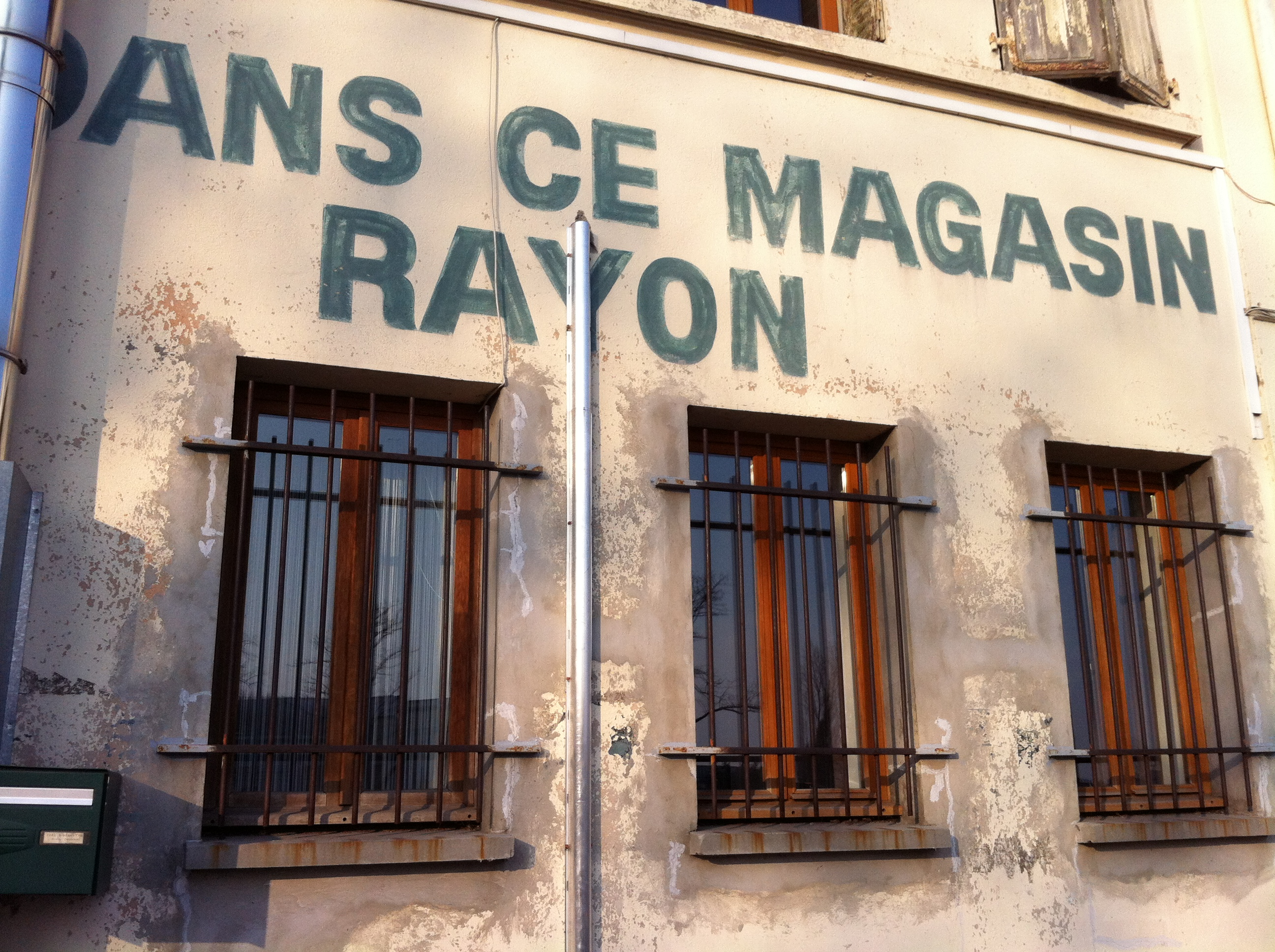 Ancienne épicerie : "Dans ce magasin, rayon" : enseigne peinte et effacée depuis la prise de la photographie.